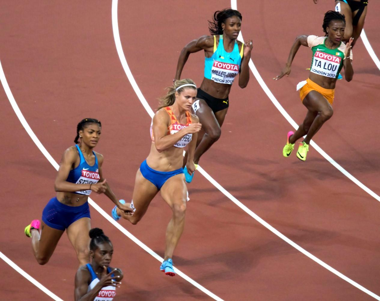 d7_32 200m dames finale